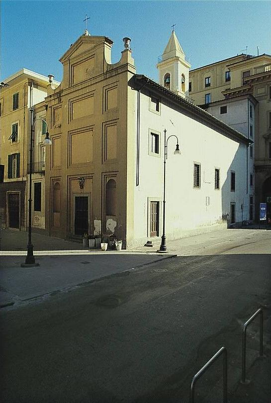 Chiesa di Santa Giulia (XVII secolo) a Livorno